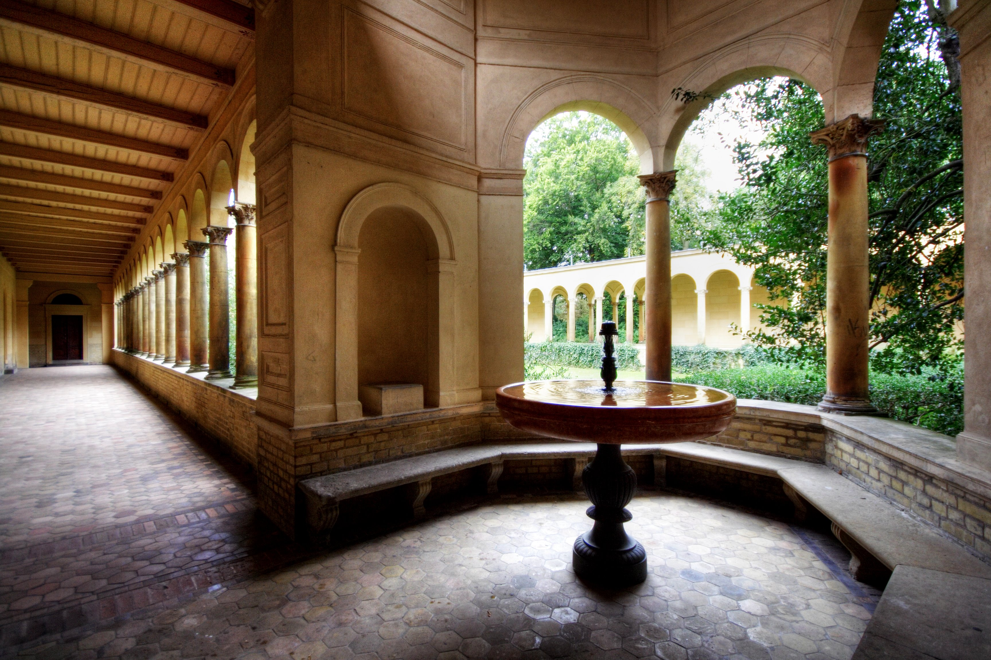 Friedenskirche von innen in Potsdam (Church of peace inside in Potsdam, Germany)